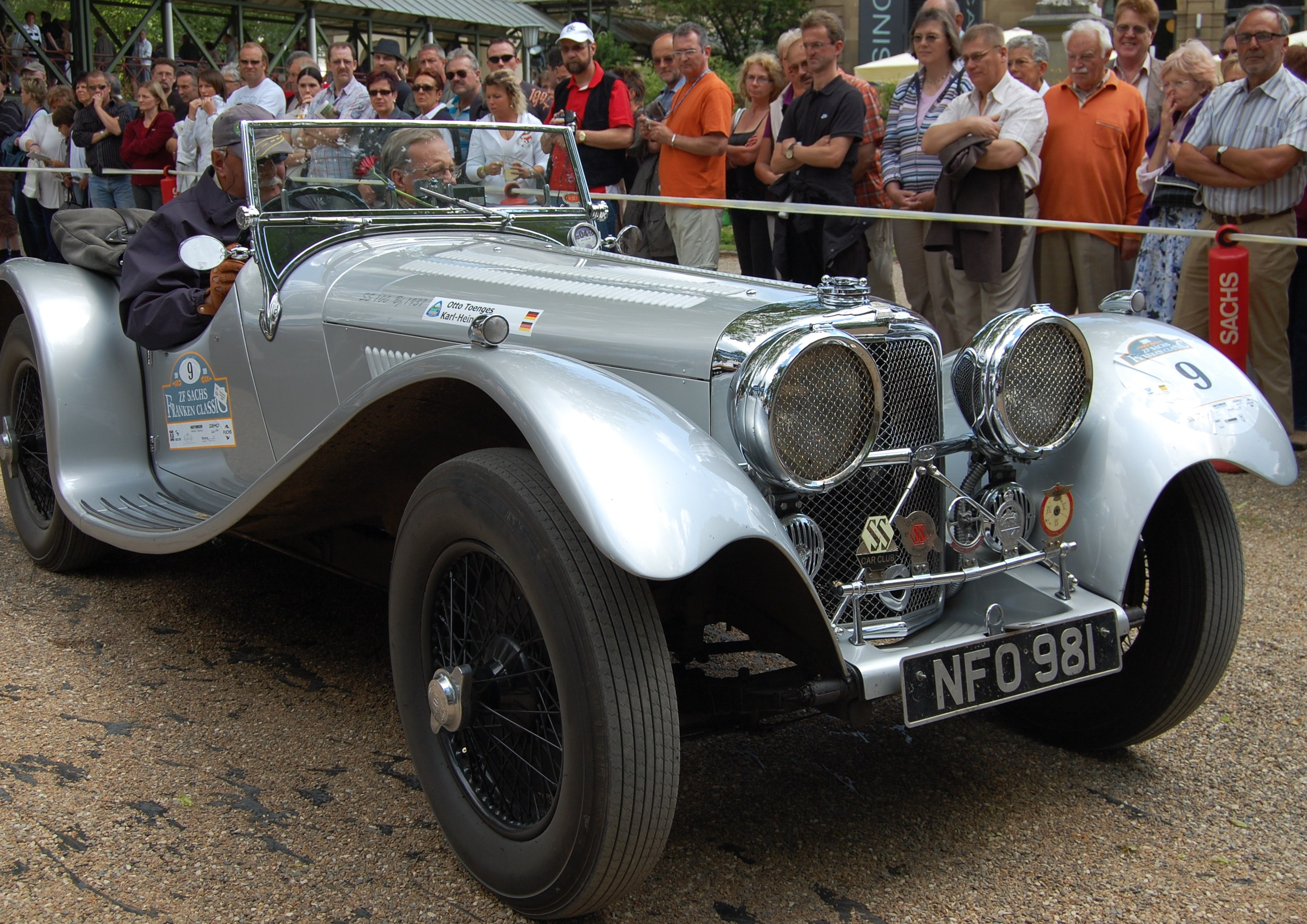 Jaguar S.S. 100, Baujahr 1938, als Teilnehmer der ZF Sachs Franken Classic 2009 in Bad Kissingen